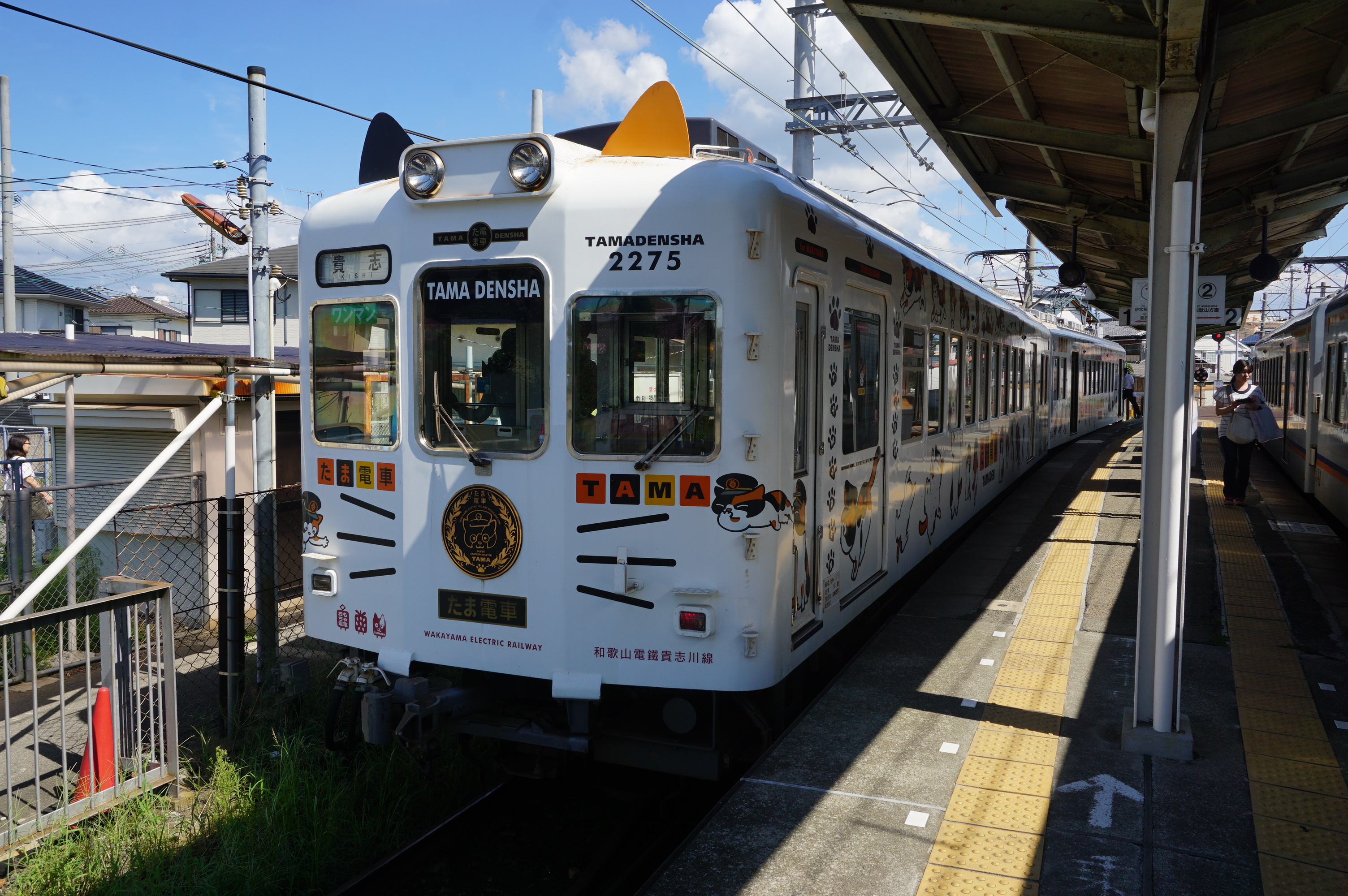 上部に耳がついた「たま電車」 Sony ILCE-6000